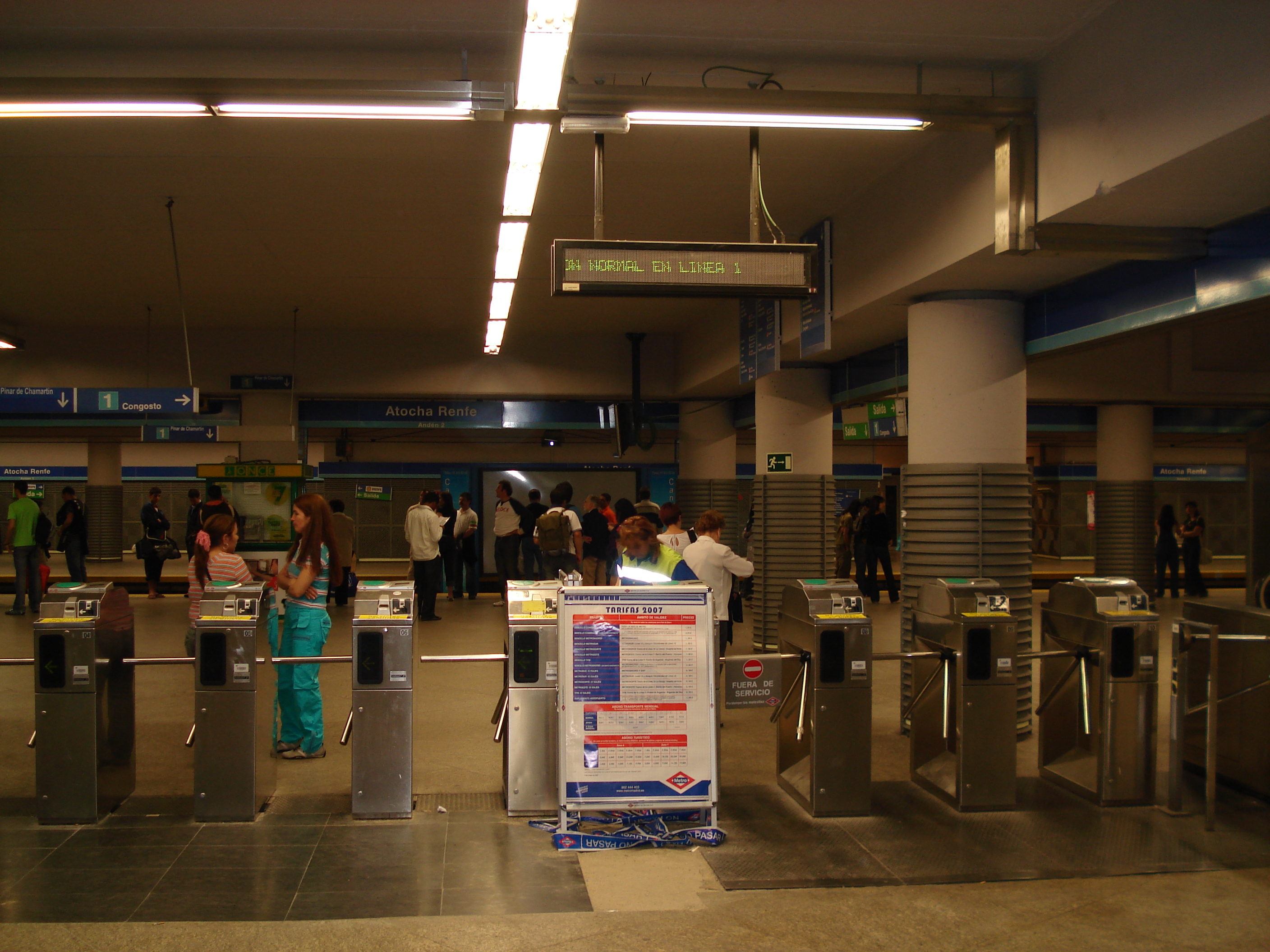 Imagen de la estacion de Atocha Renfe de Madrid